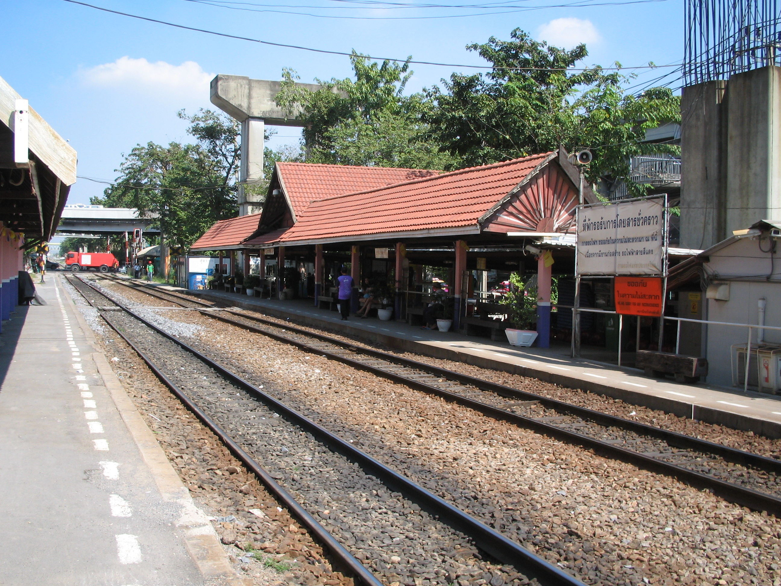 ラックシー駅構内